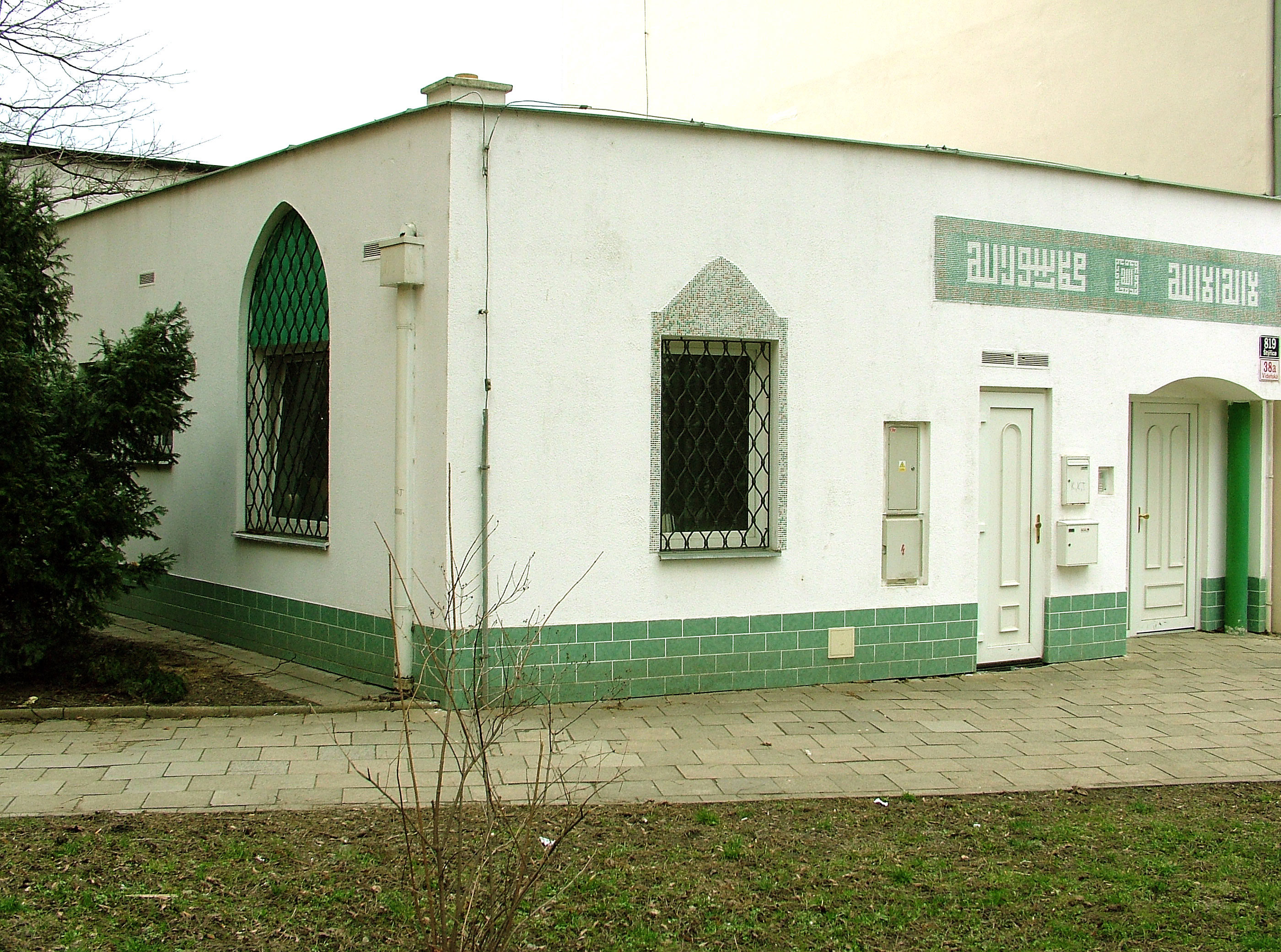 Brno Mosque - front view